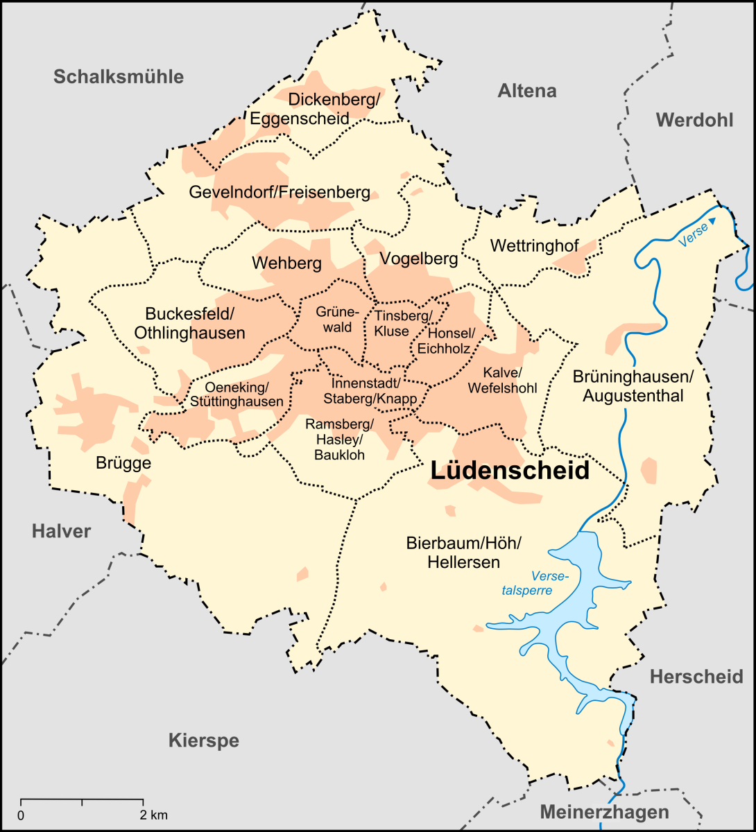 Karte der statistischen Bezirke und der Umlandgemeinden von Lüdenscheid